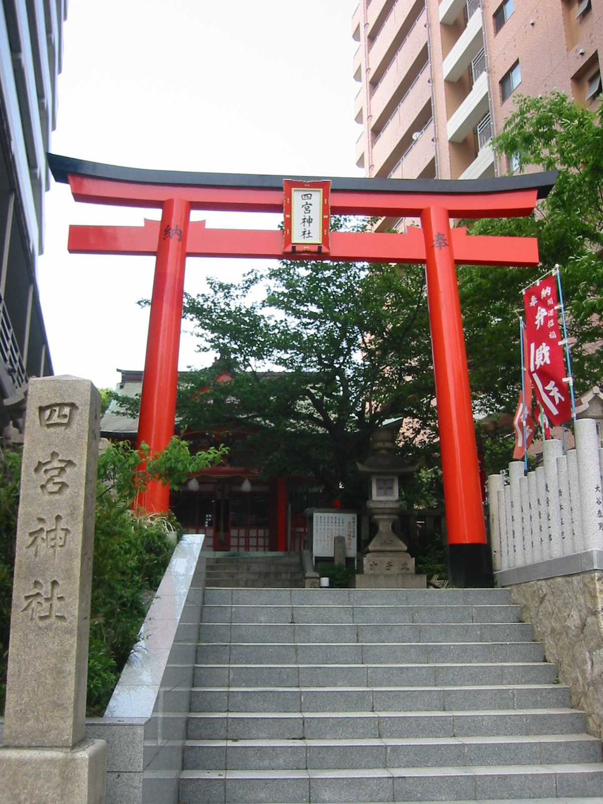 神戸四宮神社